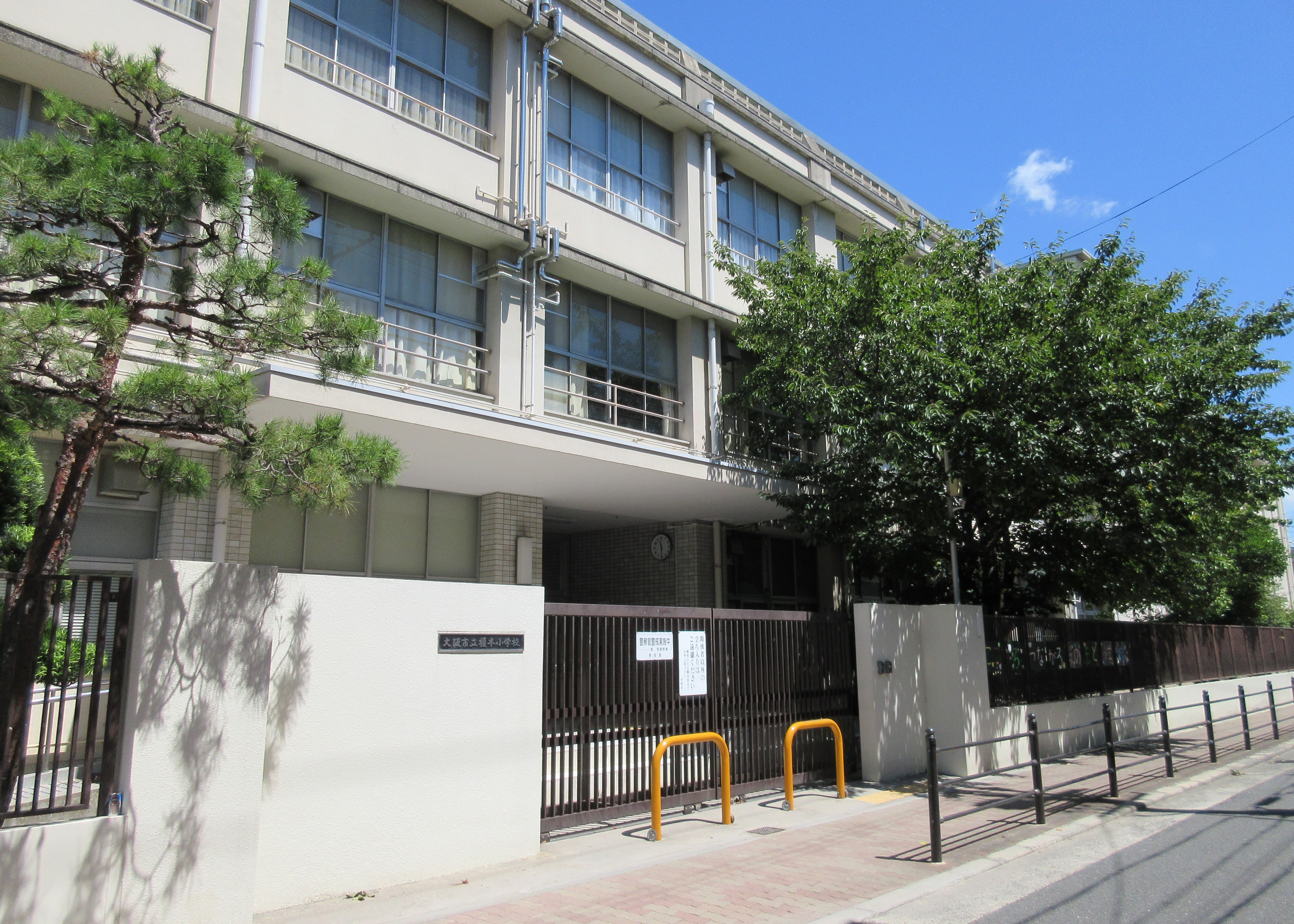 大阪市立榎本小学校